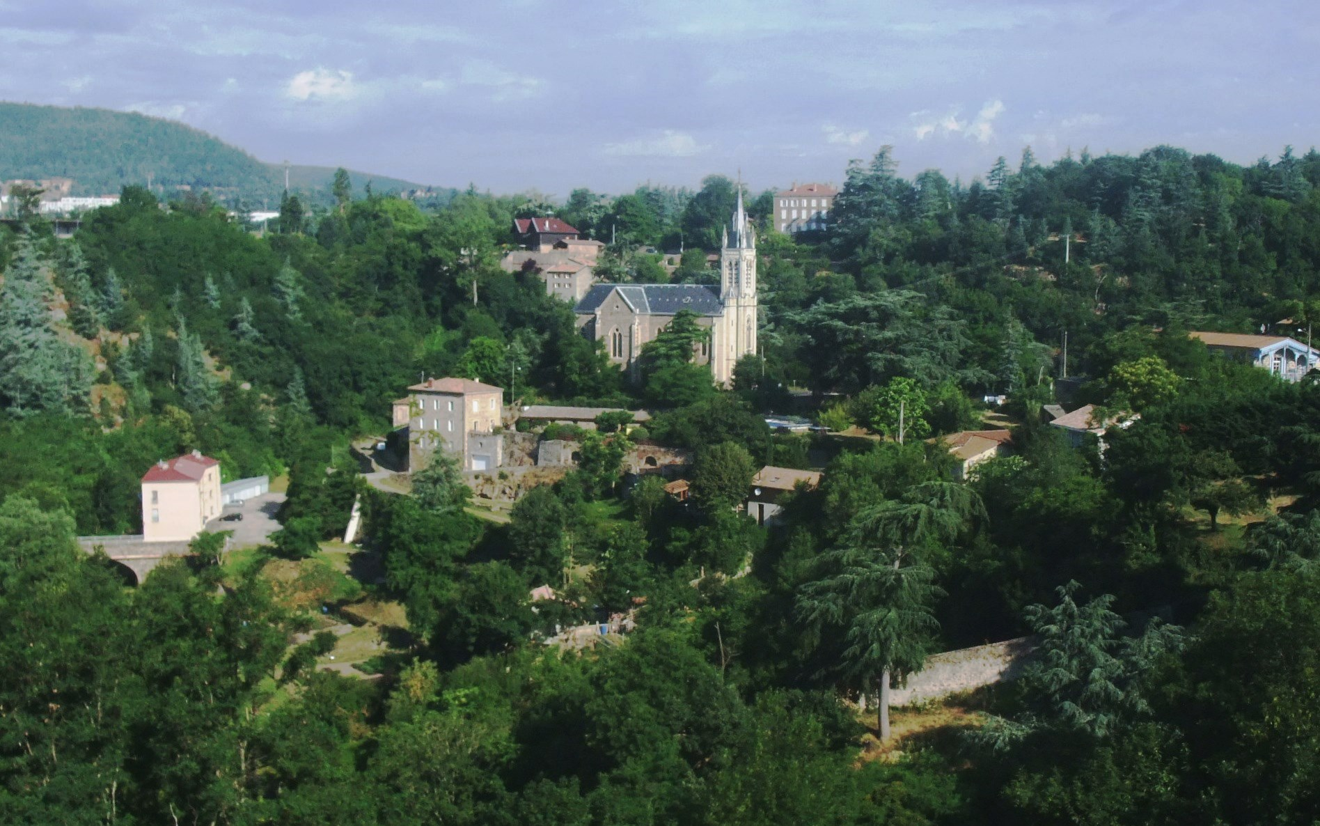 Davézieux Vidalon aujourd'hui